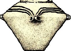 Фрагмент посуде Белегиш културе (фаза 1), урна са линијским орнаментом